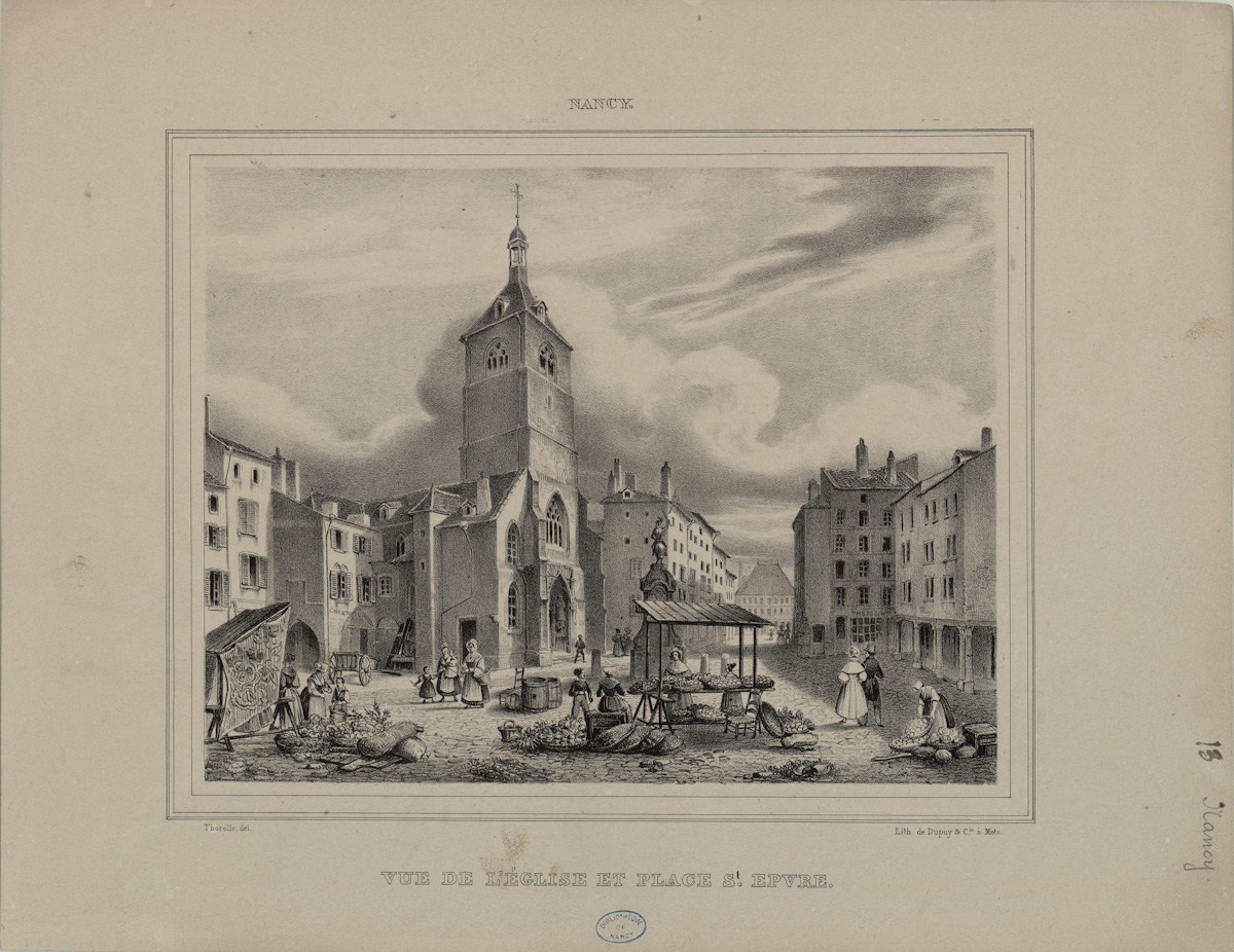 Thorelle, Jean-Joseph (1806-1889), “Vue de l'église et place Saint-Epvre,” Prosper Morey : itinéraire d'un architecte, accessed October 27, 2012